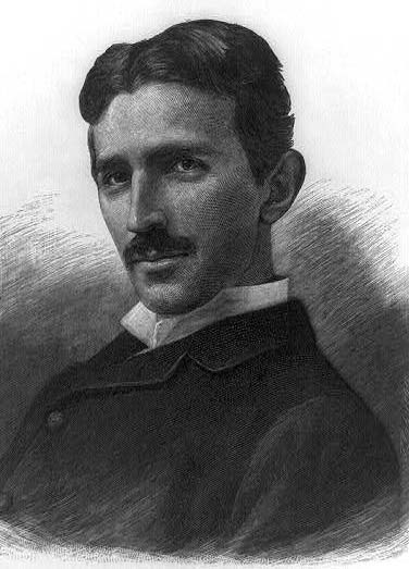 An engraving of Nikola Tesla